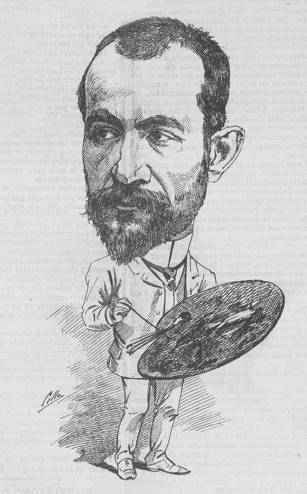 Ángel Lizcano.